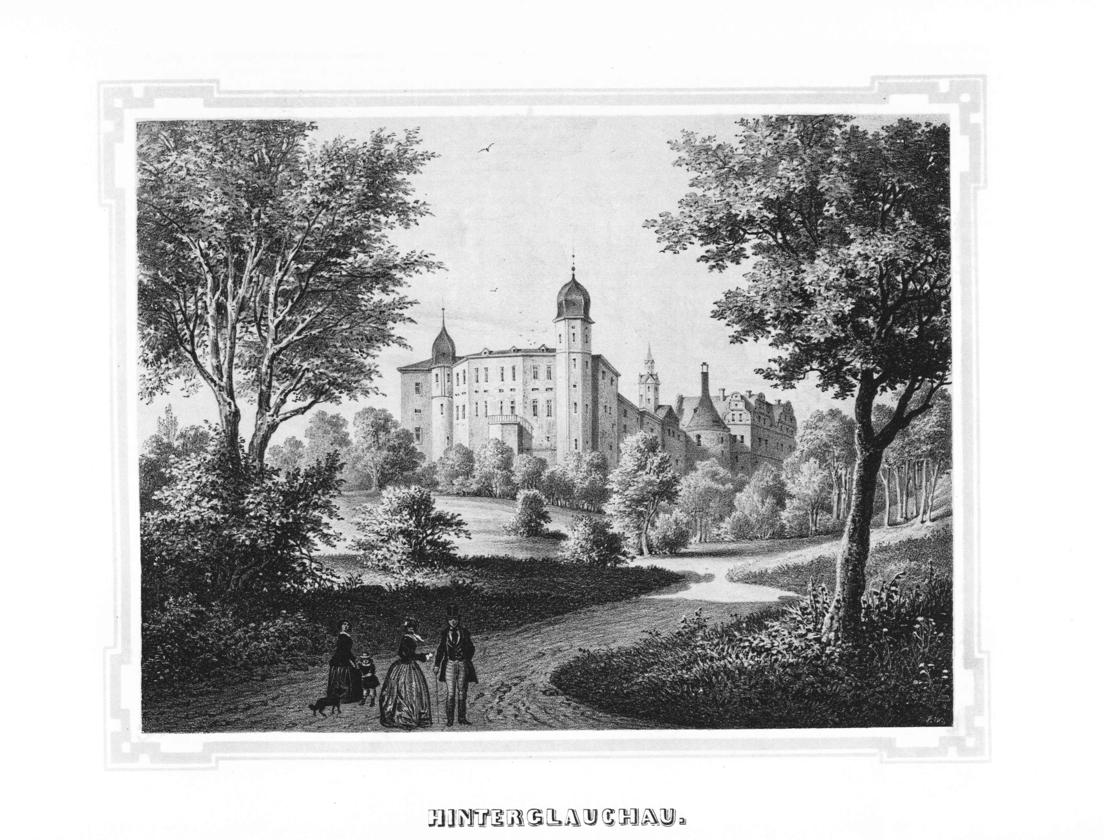 Hinterglauchau aus: Album der Rittergüter und Schlösser im Königreiche Sachsen Erzgebirgischer Kreis Section: IV